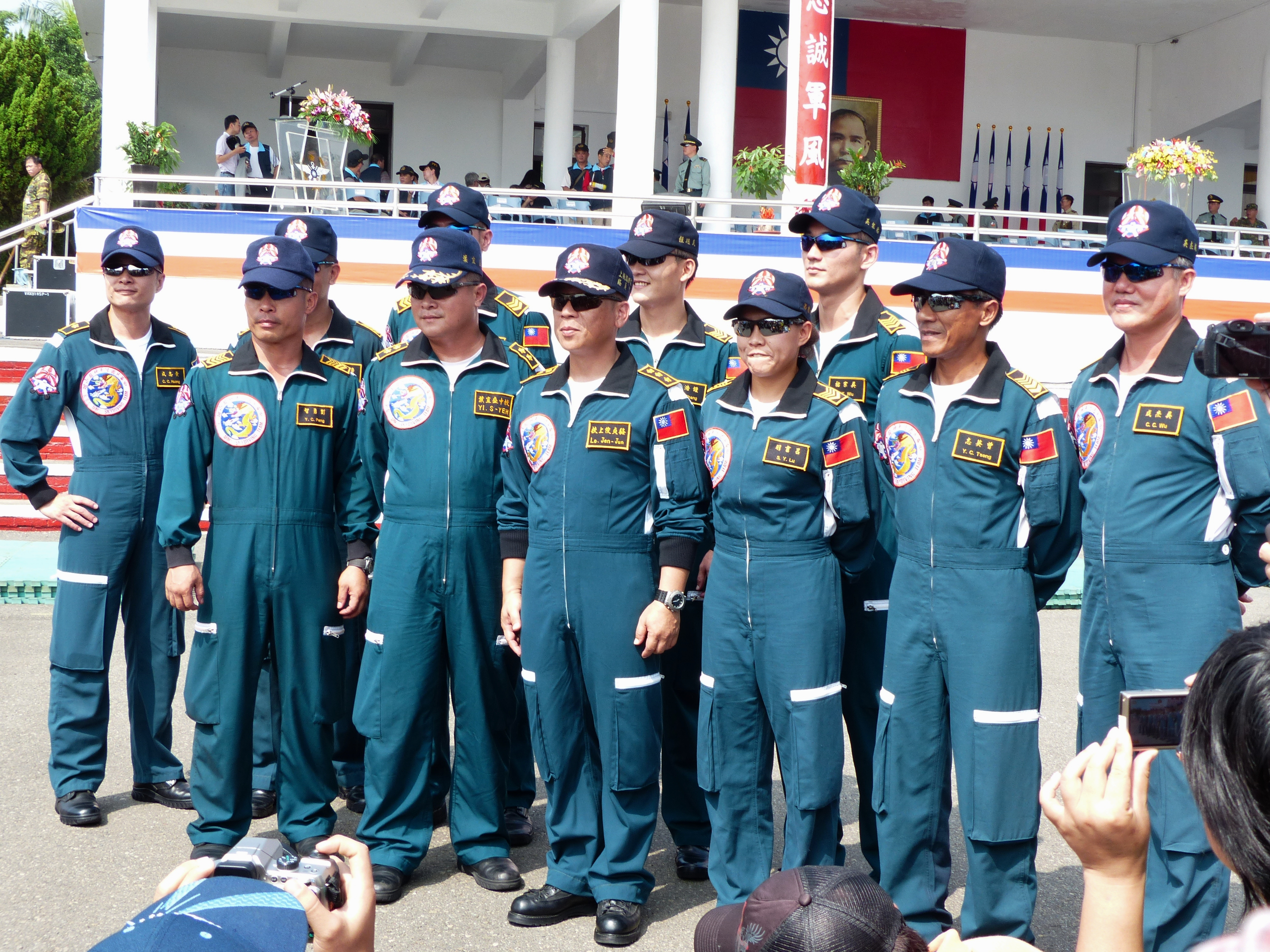 神龍小組全員集合於成功嶺大校場，接受媒體與民眾攝影。